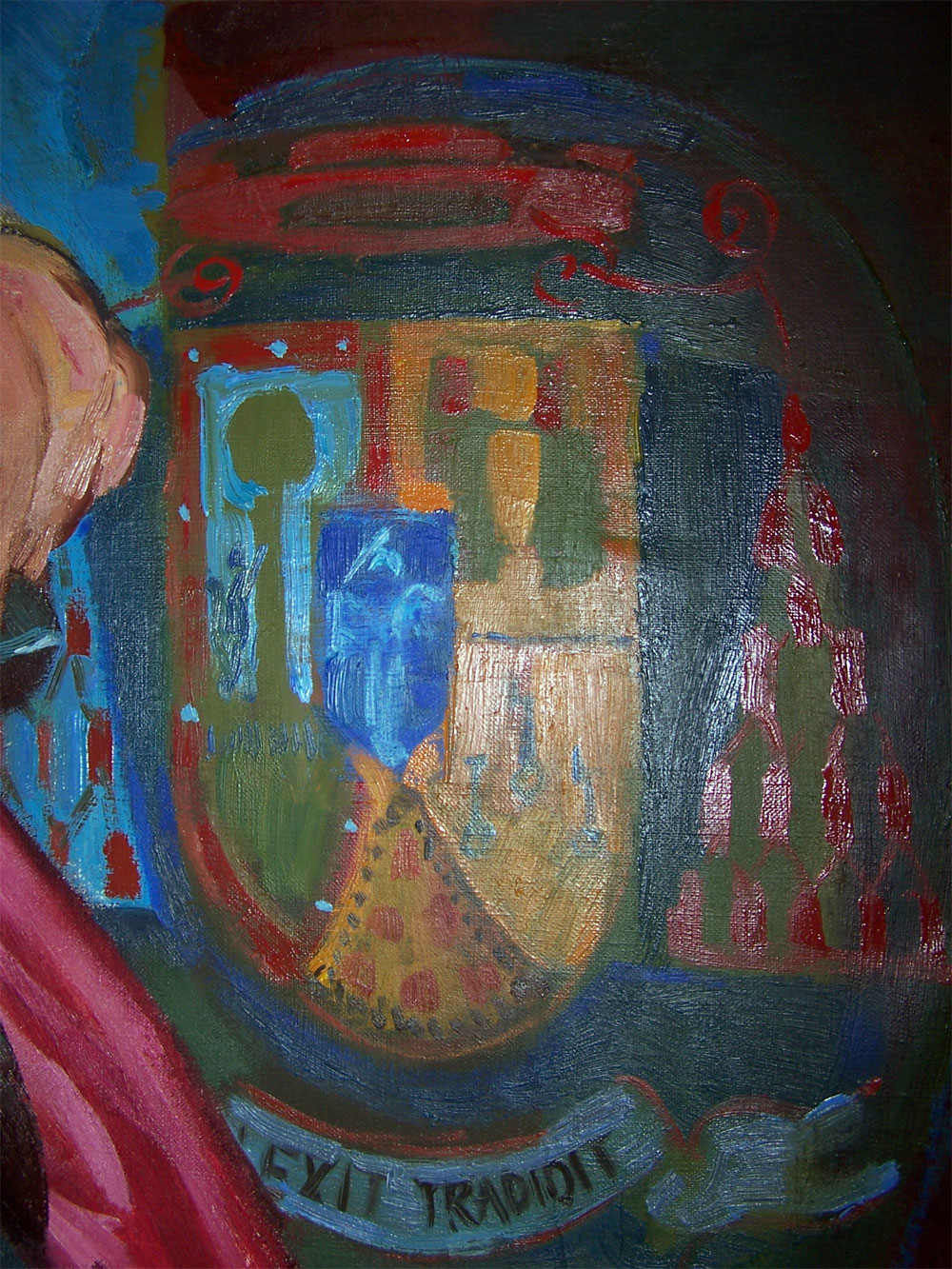 Armas de Arcadio María cardenal Larraona y Saralegui, C.M.F.